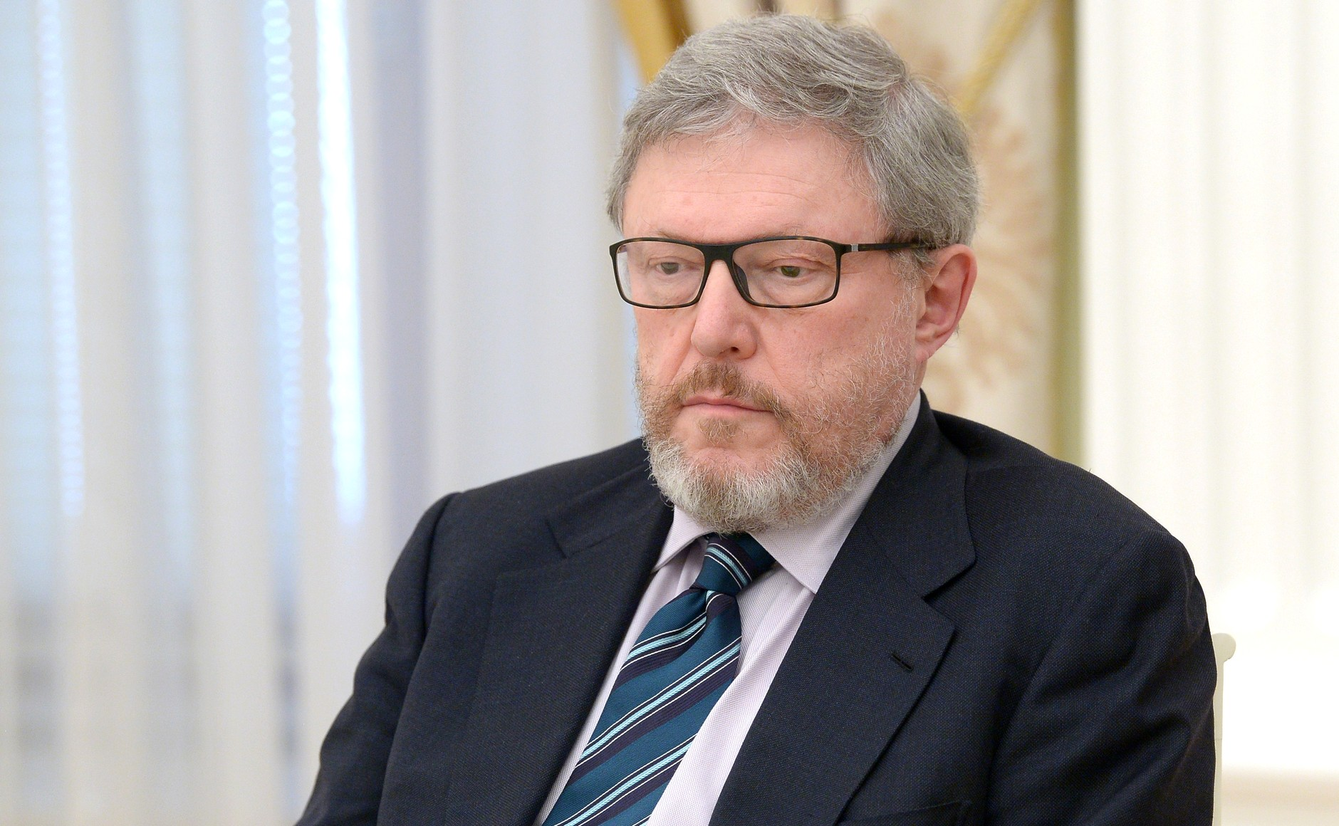 Кандидат от «Российской объединённой демократической партии «Яблоко» Григорий Явлинский перед встречей с Владимиром Путиным